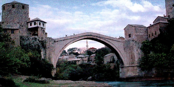 Oude ansichtkaart, in 1998 in Mostar gekregen van een bewoner van Mostar.